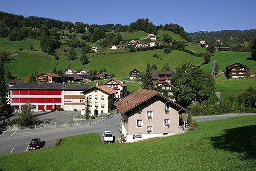 Illgau (Muotatal): Schulhaus